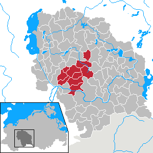 Amt Eldetal in Mecklenburg-Vorpommern - District Parchim